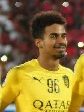 تیم السد در دیدار با پرسپولیس در لیگ قهرمانان آسیا ۲۰۱۸ در ورزشگاه آزادی